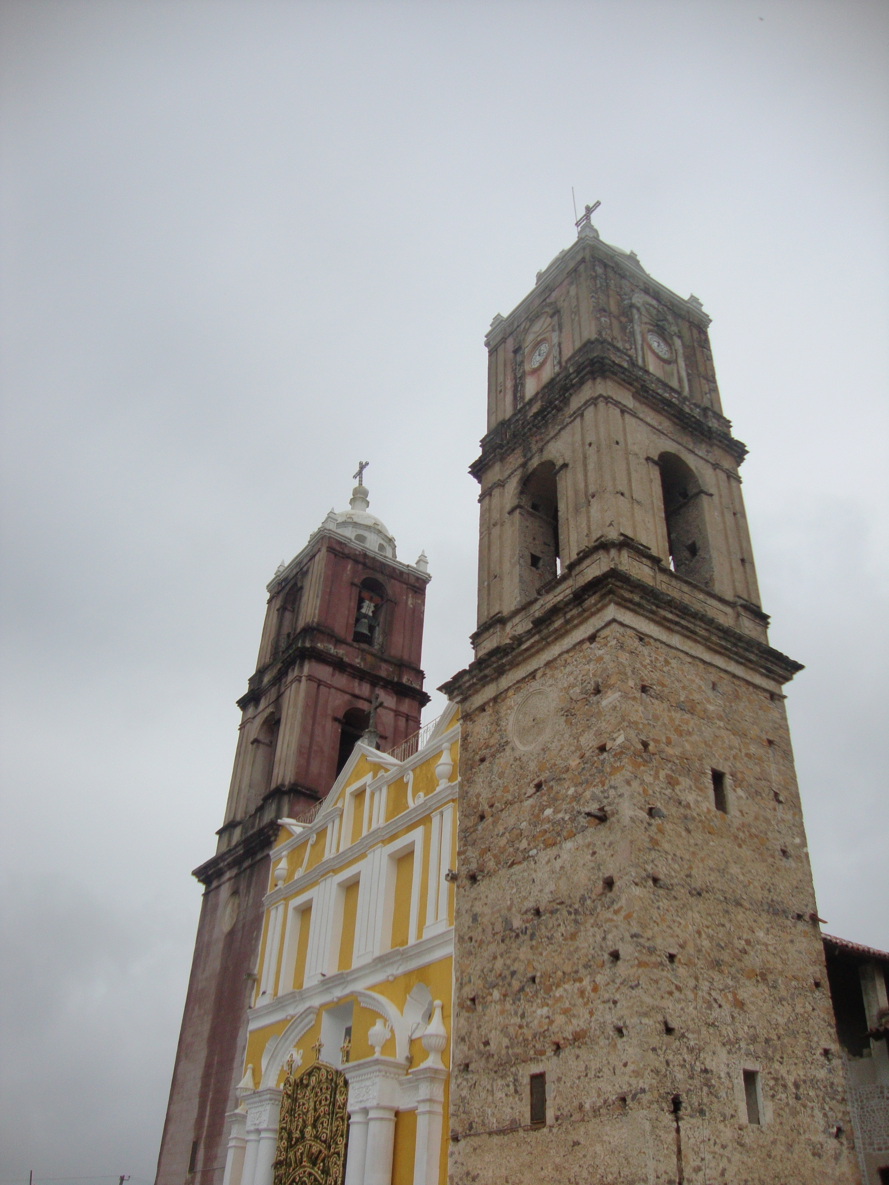 Parroquia de la Virgen Santa María de la Asunción